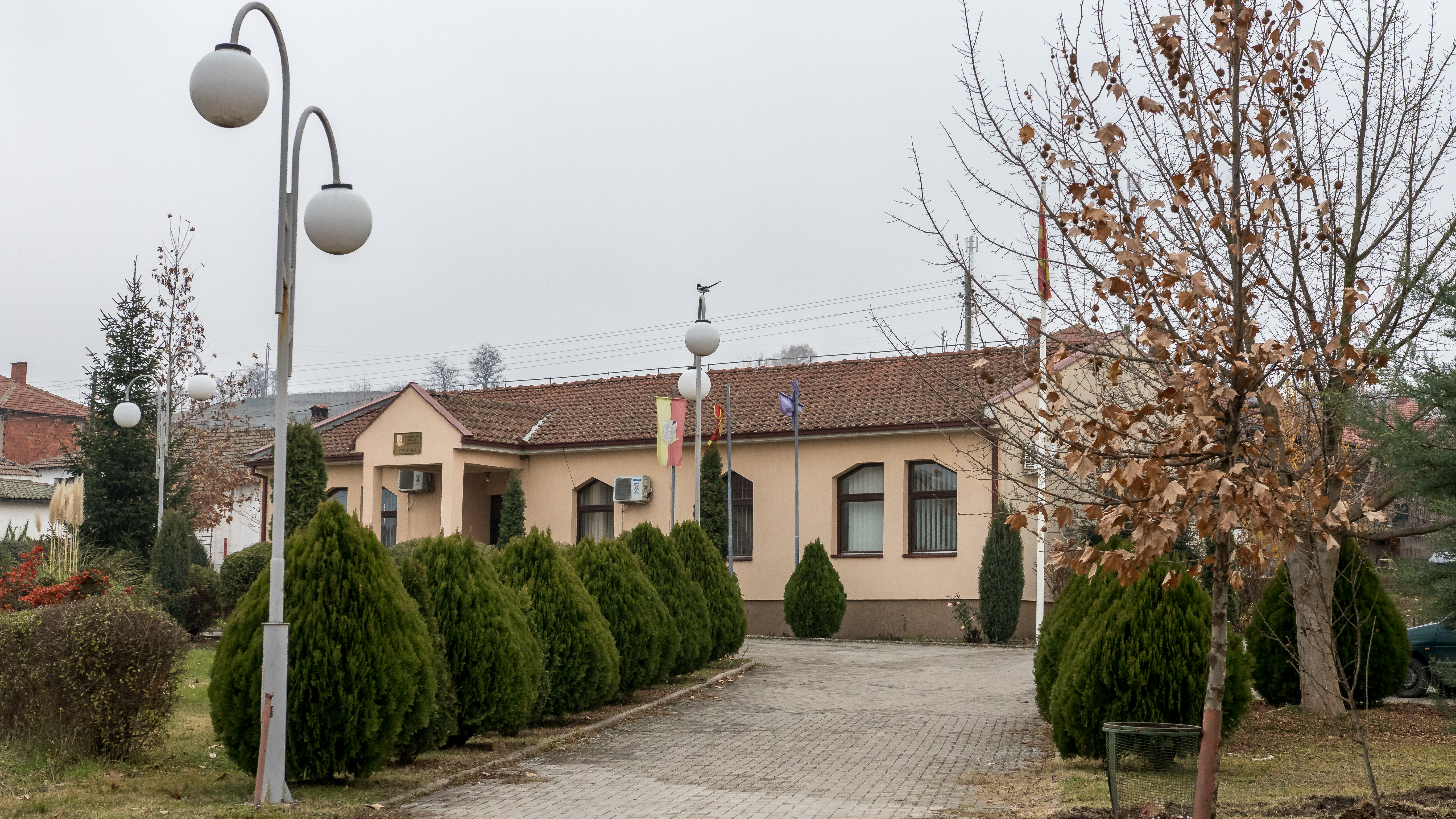 Фотографии од експедицијата во Градско